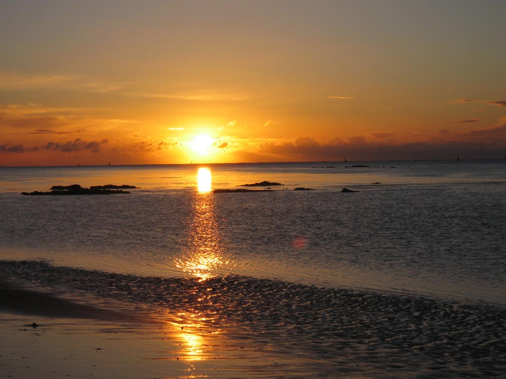 Puesta de sol en Sanlúcar de Barrameda